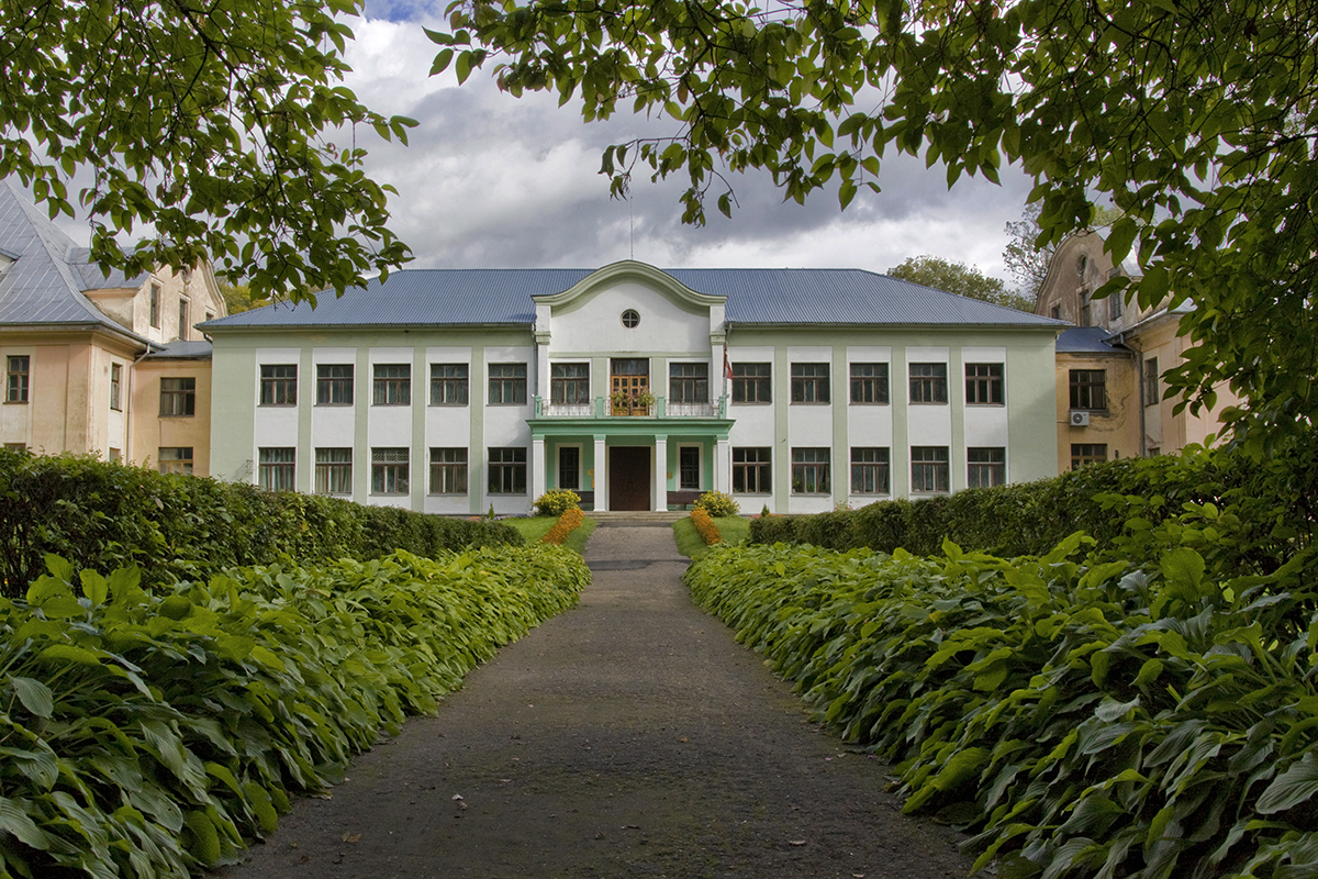 Pēc Otrā pasaules kara pārbūvētā Malnavas muiža